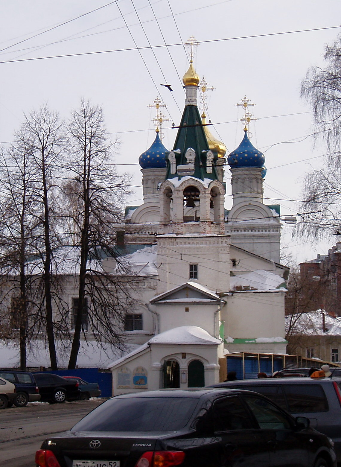 Церковь Знамения Божией Матери и святых Жен-Мироносиц. Нижний Новгород, Ильинская слобода.